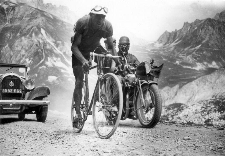 Spaarnestad Photo, SFA001020269 De Spanjaard Federico Ezquerra, die als eerste over de top van de Télégraphe en de Galibier ging in deze etappe. Tour de France 1934. Collectie SPAARNESTAD PHOTO/Het Leven Federico Ezquerra (Spain) who was the first to reach the top of the Télégraphe and the Galibier in this stage. Tour de France 1934. Location unknown. Voor meer informatie en voor meer foto’s uit de collectie van Spaarnestad Photo, bezoek onze Beeldbank: U kunt ons helpen onze kennis van de fotocollecties te verrijken door tags en commentaren toe te voegen. Herkent u mensen of locaties of heeft u een bijzonder verhaal te vertellen bij één van de foto’s, laat dan een reactie achter (als u ingelogd bent bij Flickr) of stuur een mailtje naar: You can help us gain more knowledge on the content of our collection by simply adding a comment with information. If you do not wish to log in, you can write an e-mail to